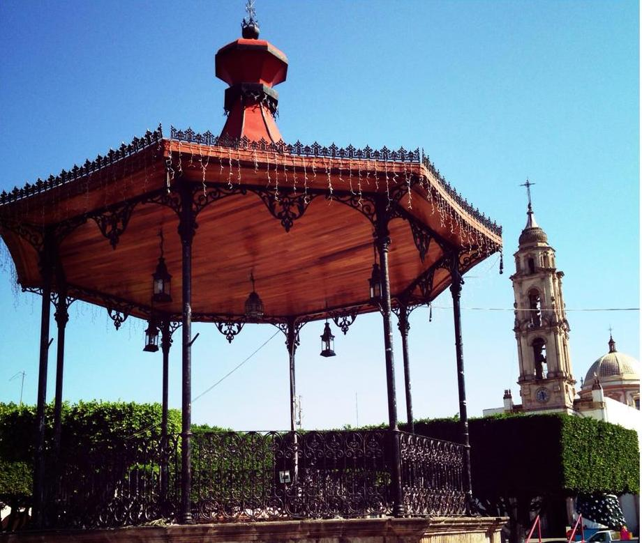 Centro Histórico de Uriangato, Gto.